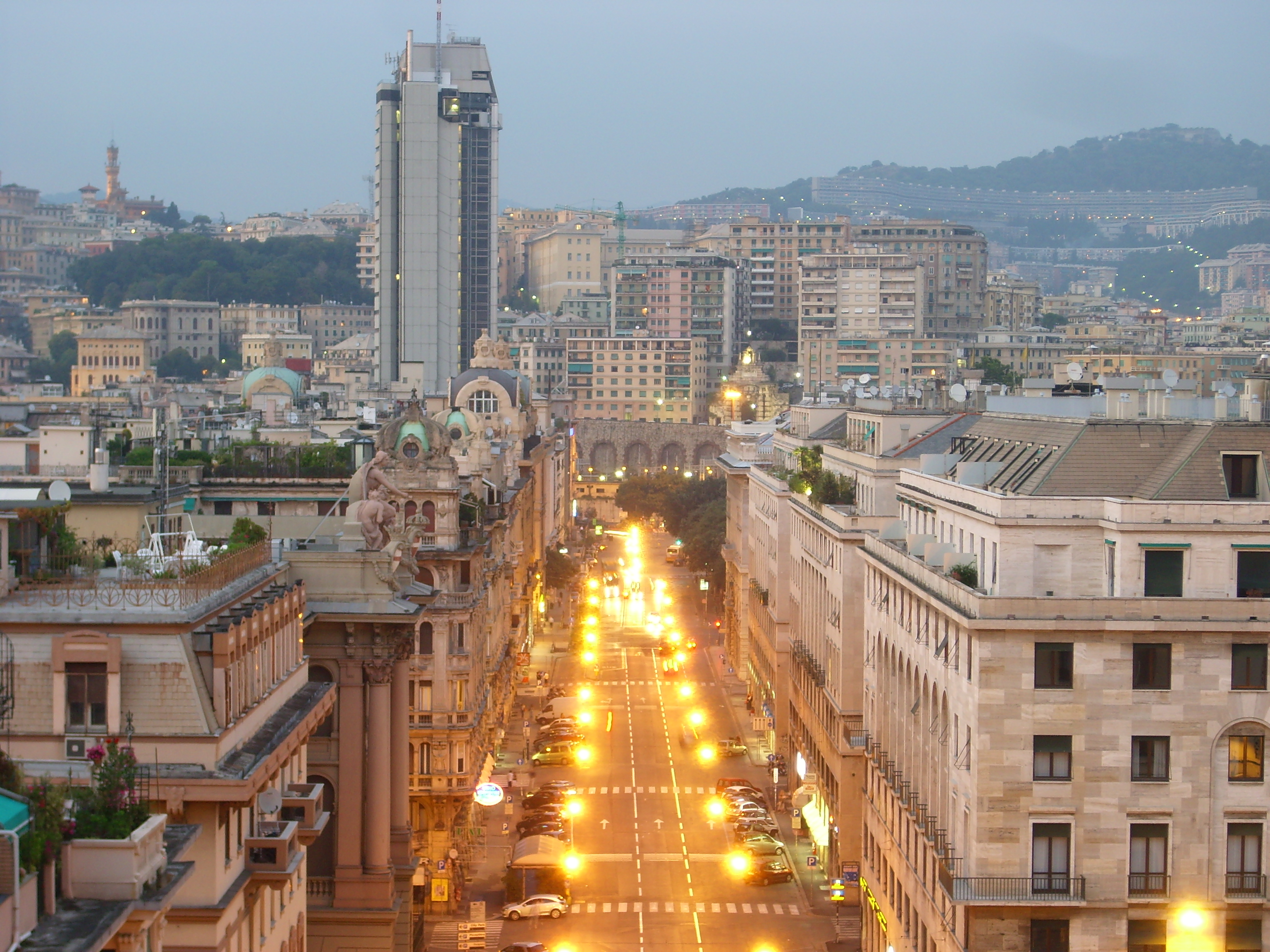 Via Brigata Liguria a Genova, sullo sfondo il grattacielo della SIP